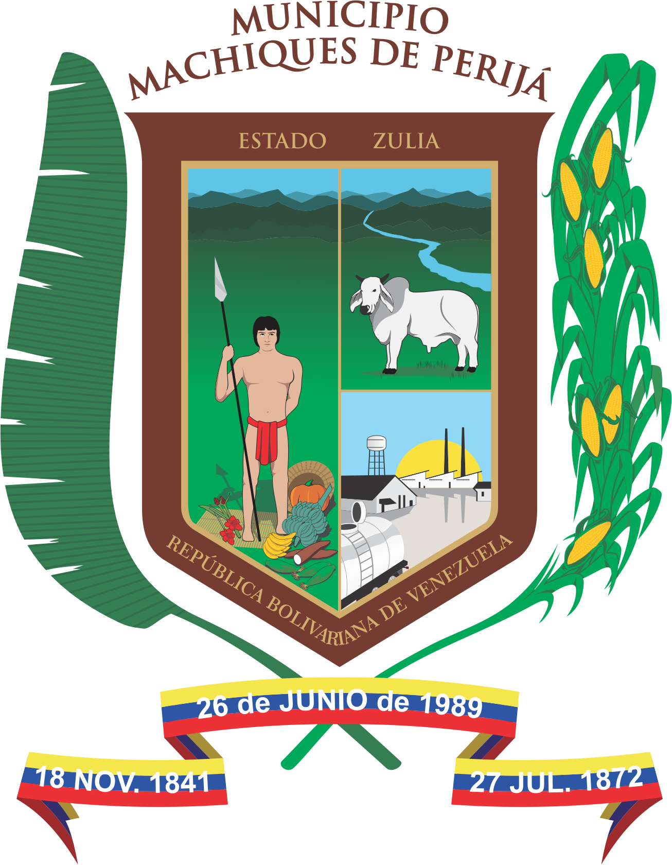 El escudo del Municipio Machiques de Perijá se basa en la propuesta presentada originalmente para el escudo de armas del Distrito Perijá por el Sr. Mario Romero con las modificaciones hechas por el historiador Dr. Rutilio Ortega González, el cual, dio el diseño final al escudo el Artista Plástico Yuri Hernández. Los elementos compositivos del escudo justifican los valores históricos, económicos y religiosos del municipio.